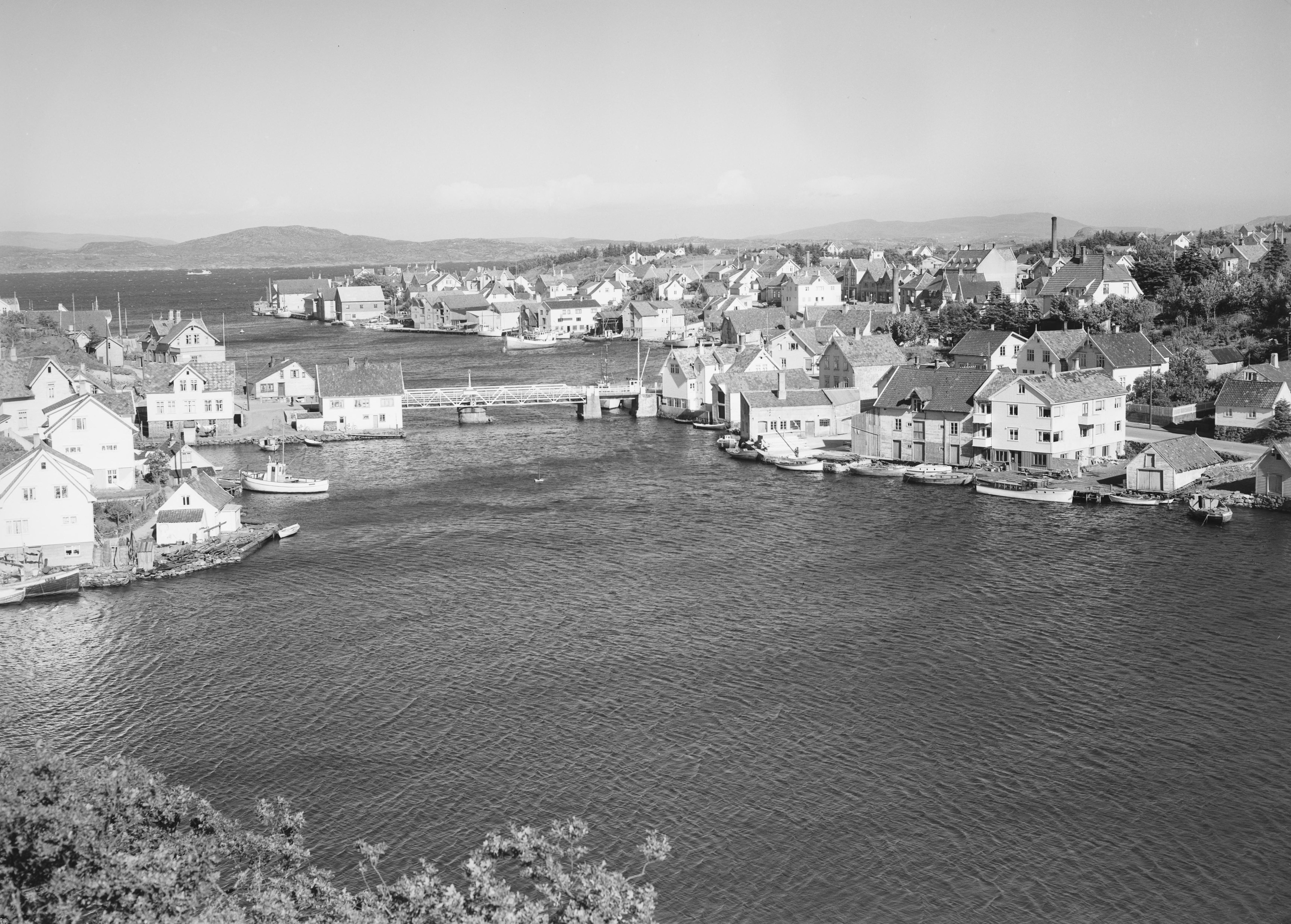 Bildet er hentet fra Nasjonalbibliotekets bildesamling. Anmerkninger til bildet var: Fotograf ukjent. Kopervik, Karmøy, Rogaland